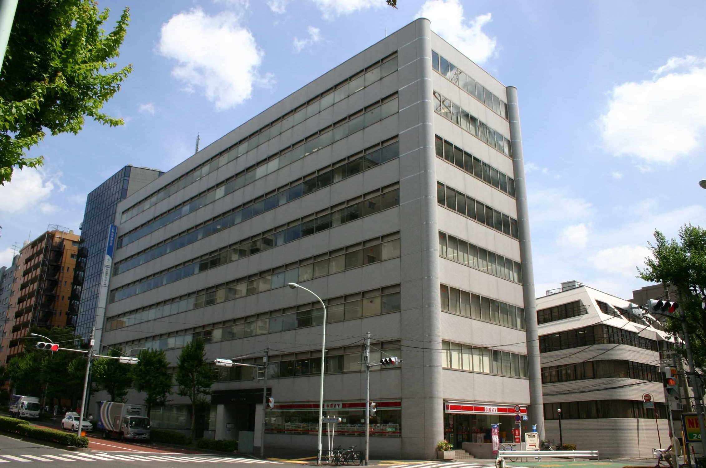 本社外観